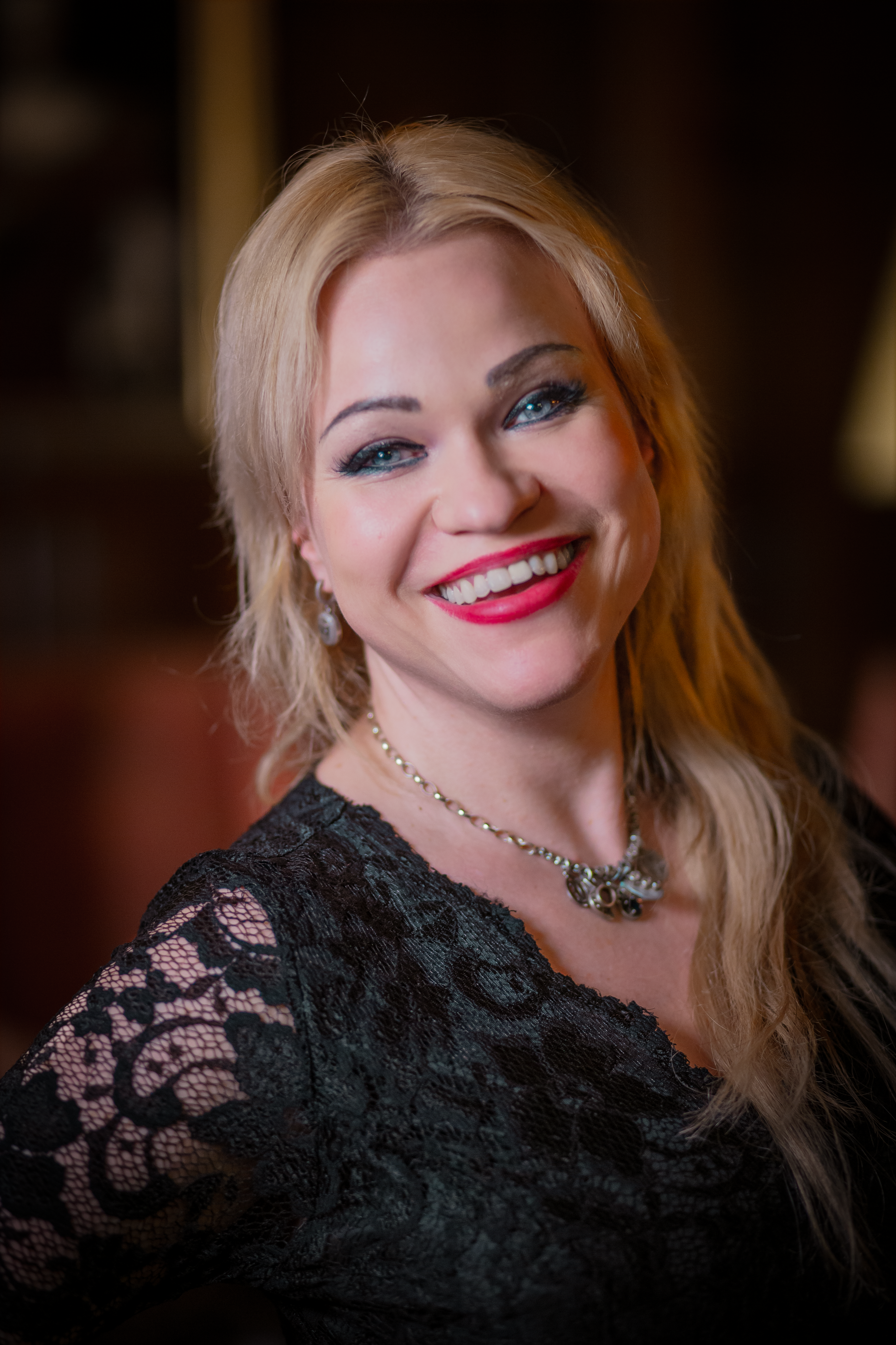 Jennah Karthes im Atlantic Parkhotel in Baden-Baden 2020